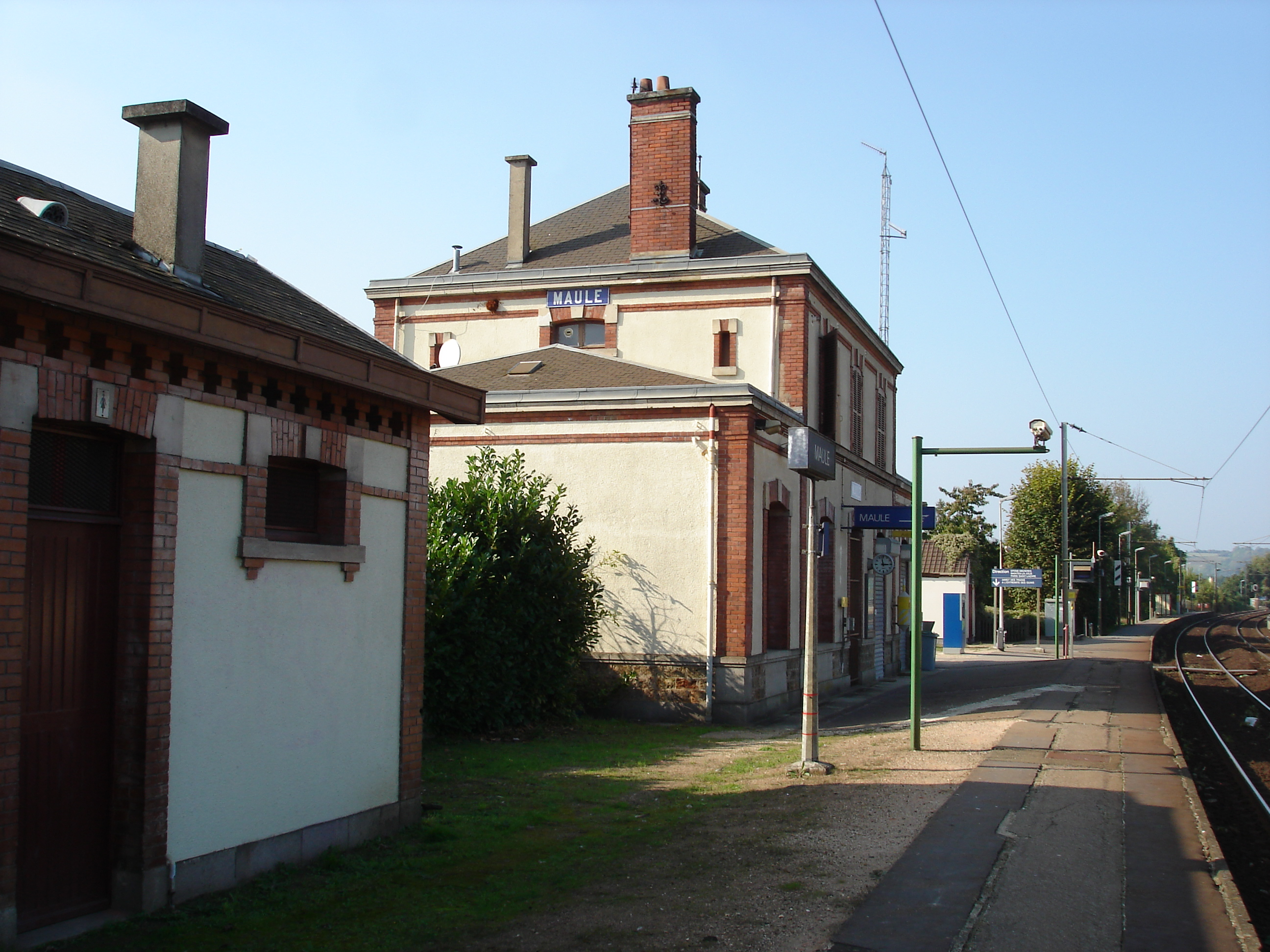 Gare de Maule (78) : Le bâtiment voyageurs et l'ancien bâtiment sanitaire.